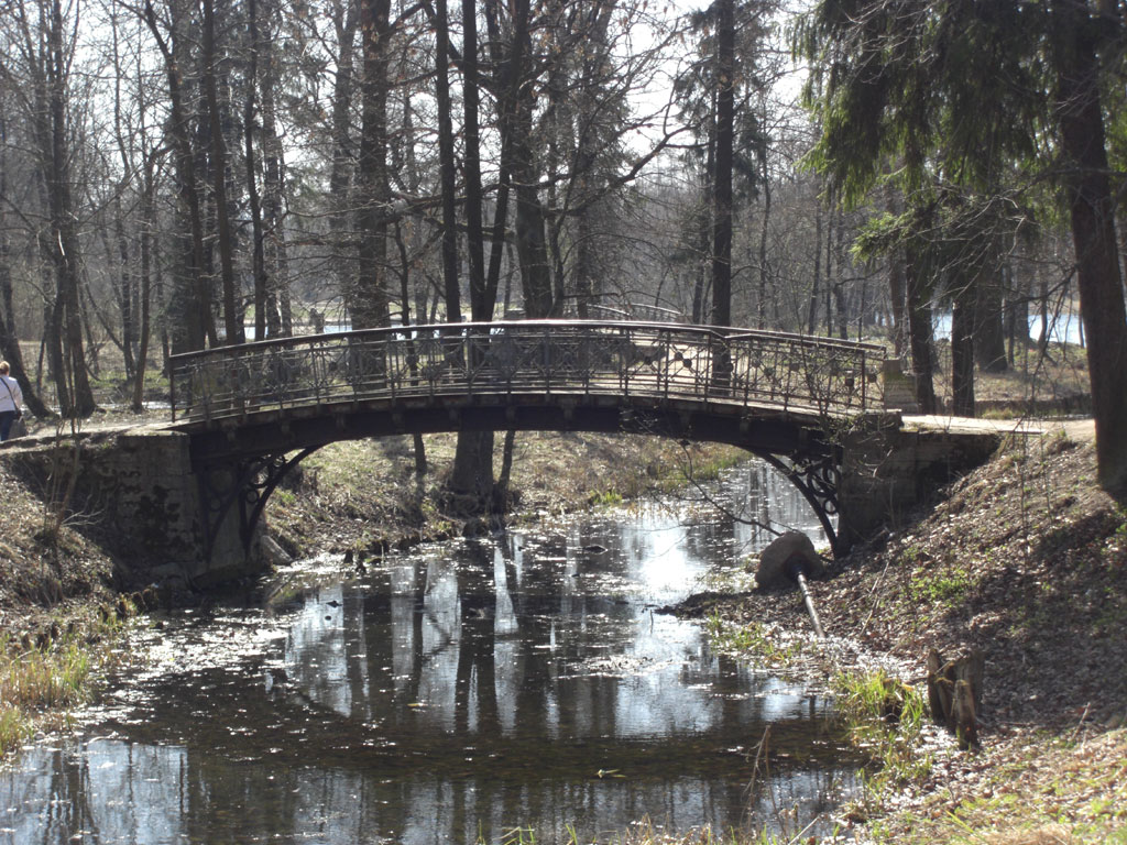 Мост в Дворцовом парке Гатчины